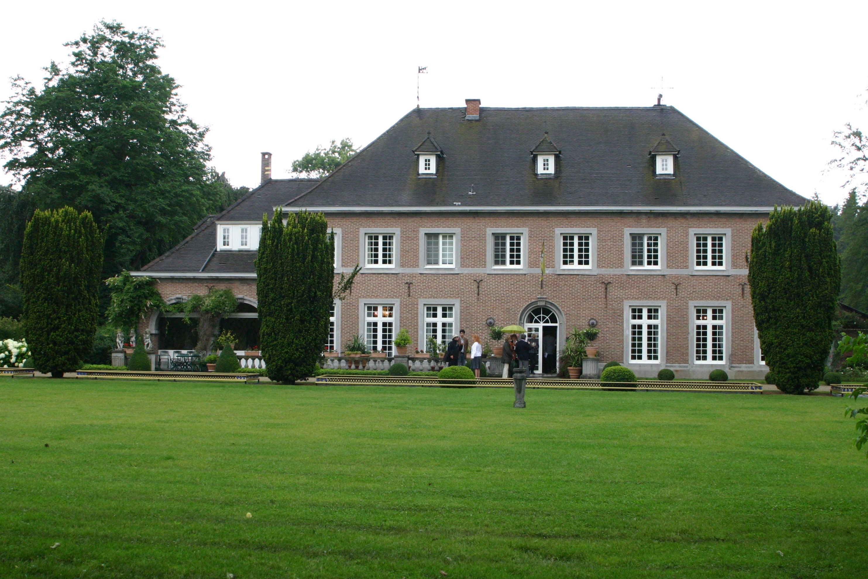 D'Schlass Hamel zu Lummen.